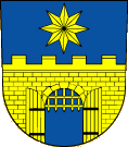 Znak obce Divišov